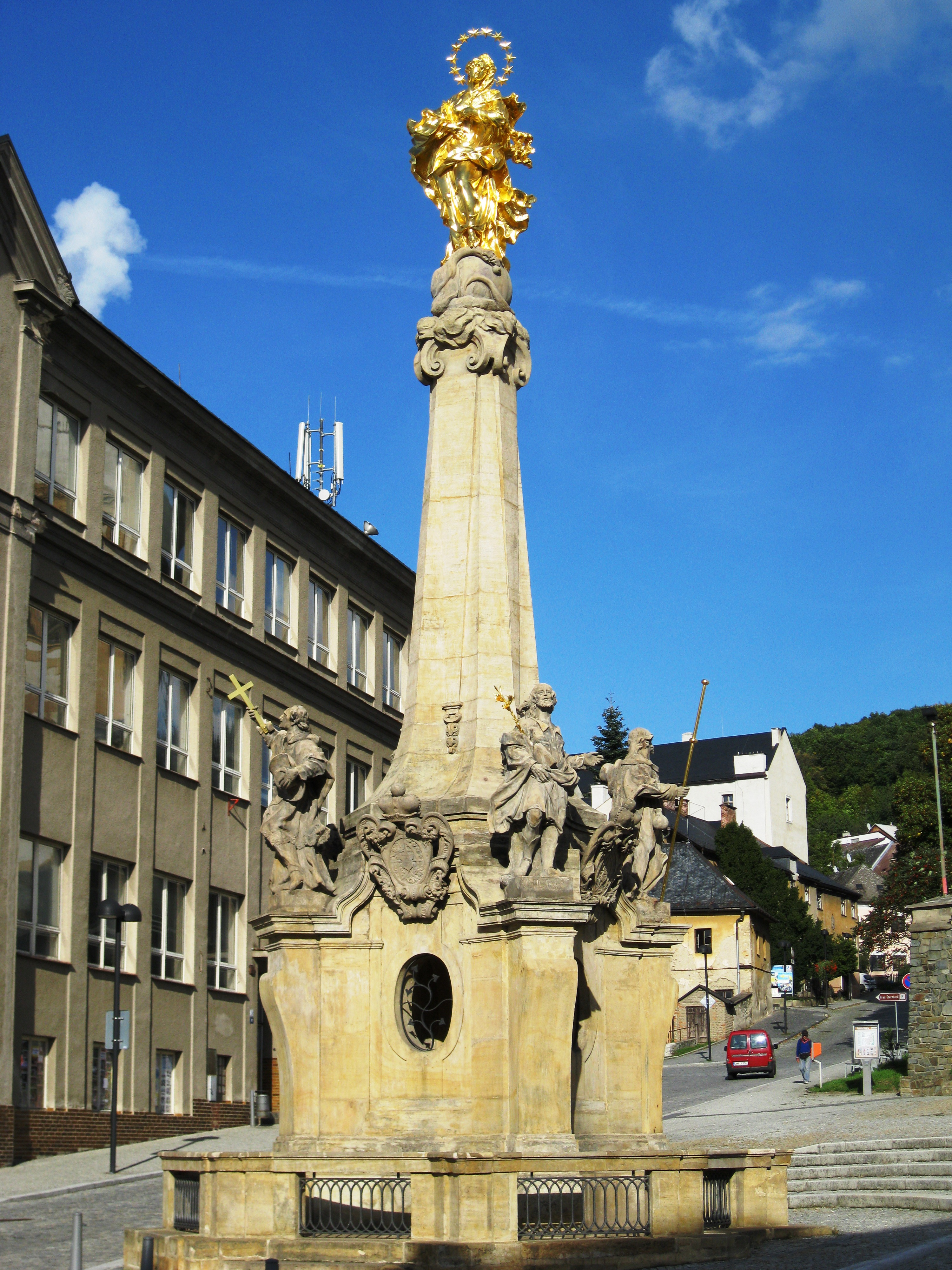 Sloup se sousoším - Mariánský sloup (Šternberk), Horní náměstí, při kostele Zvěst. P. Marie, Šternberk